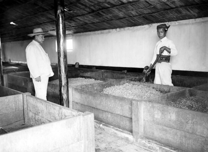 Negatief. De fermenteerbakken voor cacao op onderneming Getas, Midden-Java